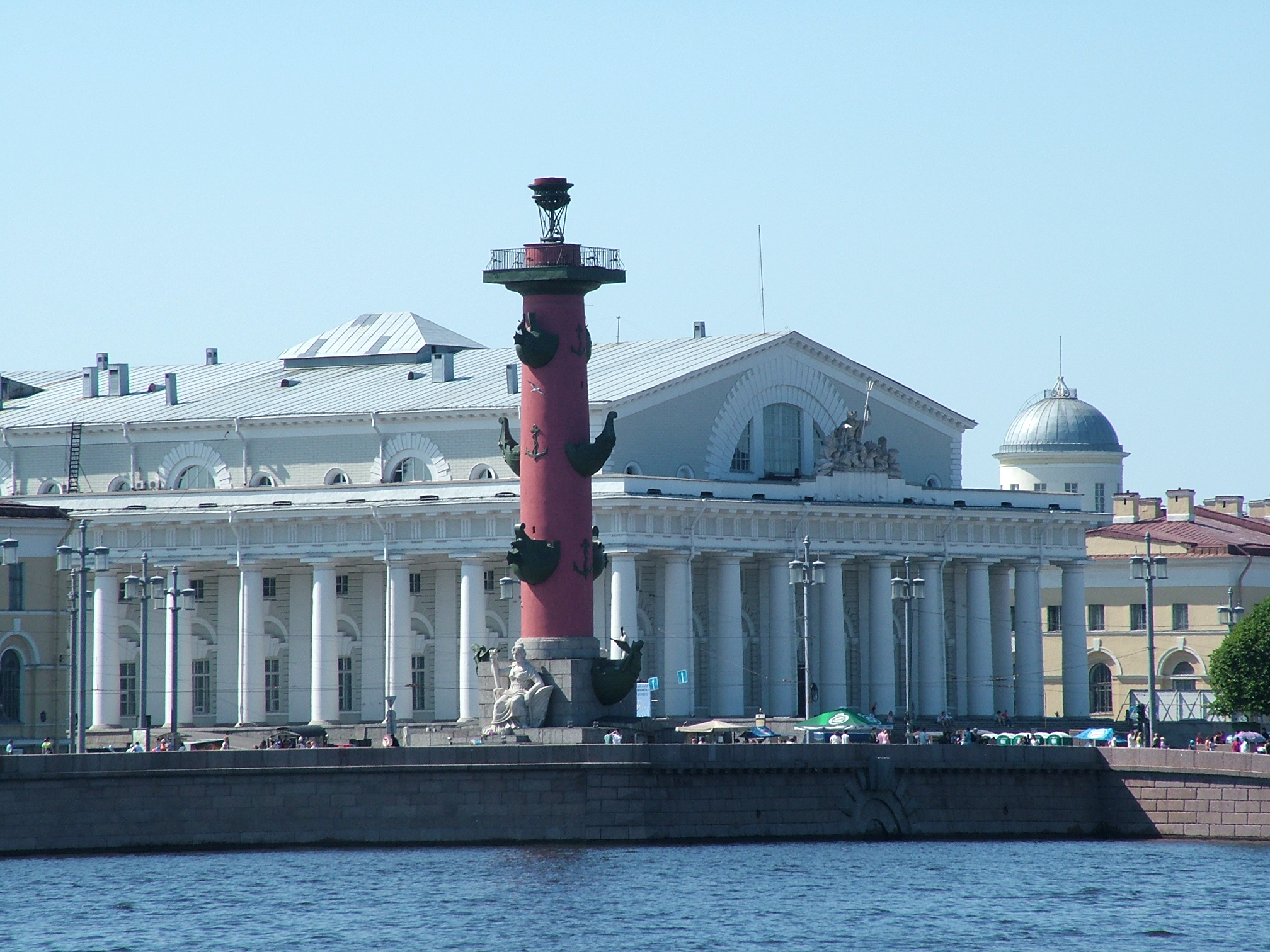 Lighthouse on Vasilievsky Island. St.Petersburg, Russia.